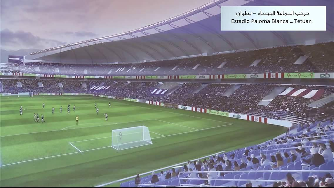 ملعب الحمامة البيضاء تطوان من الداخل Estadio Paloma Blanca en Tetuan